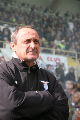 S.S. Lazio coach, Delio Rossi